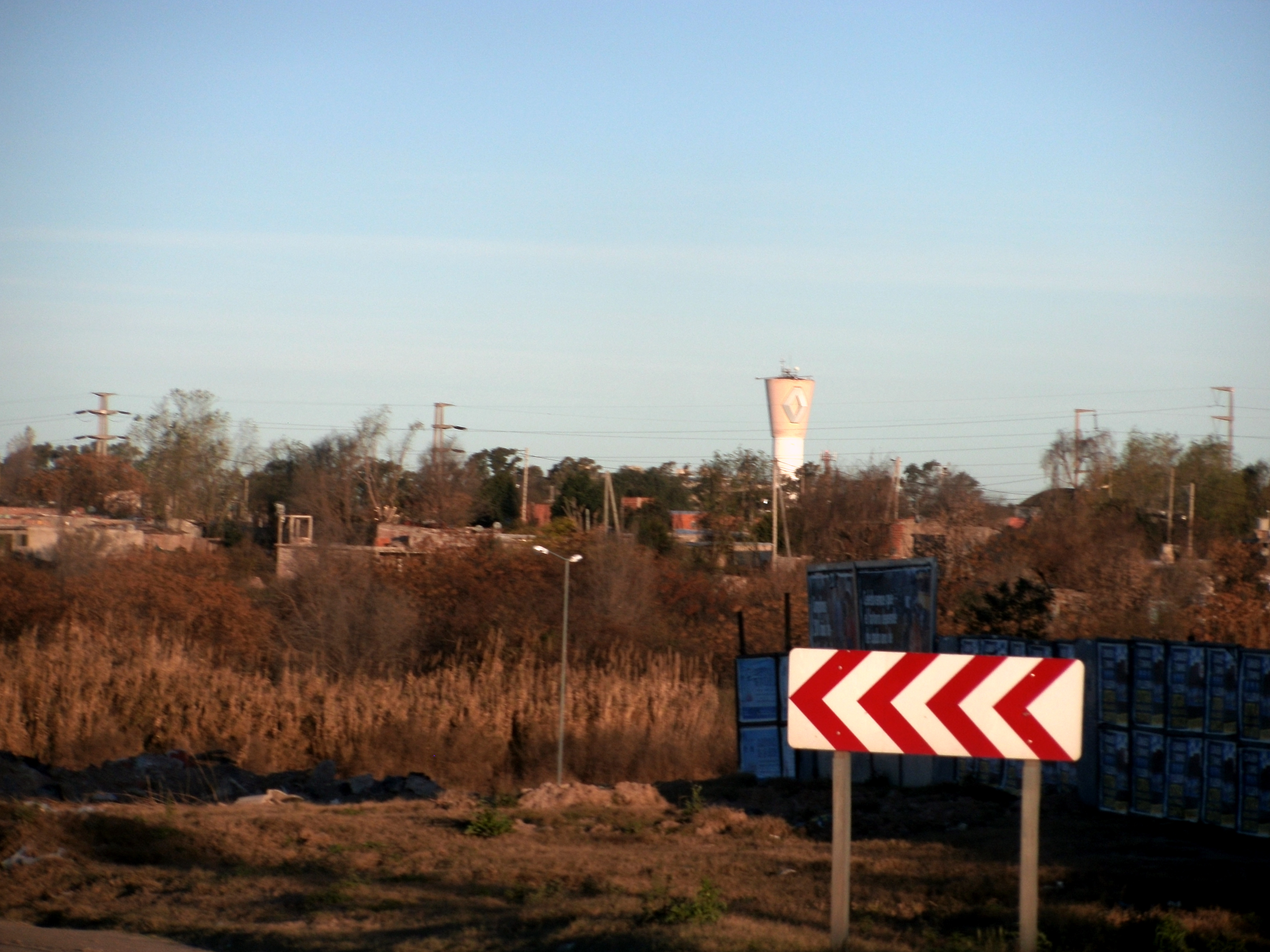 El barrio cordobés con la fábrica de autos sobresaliendo